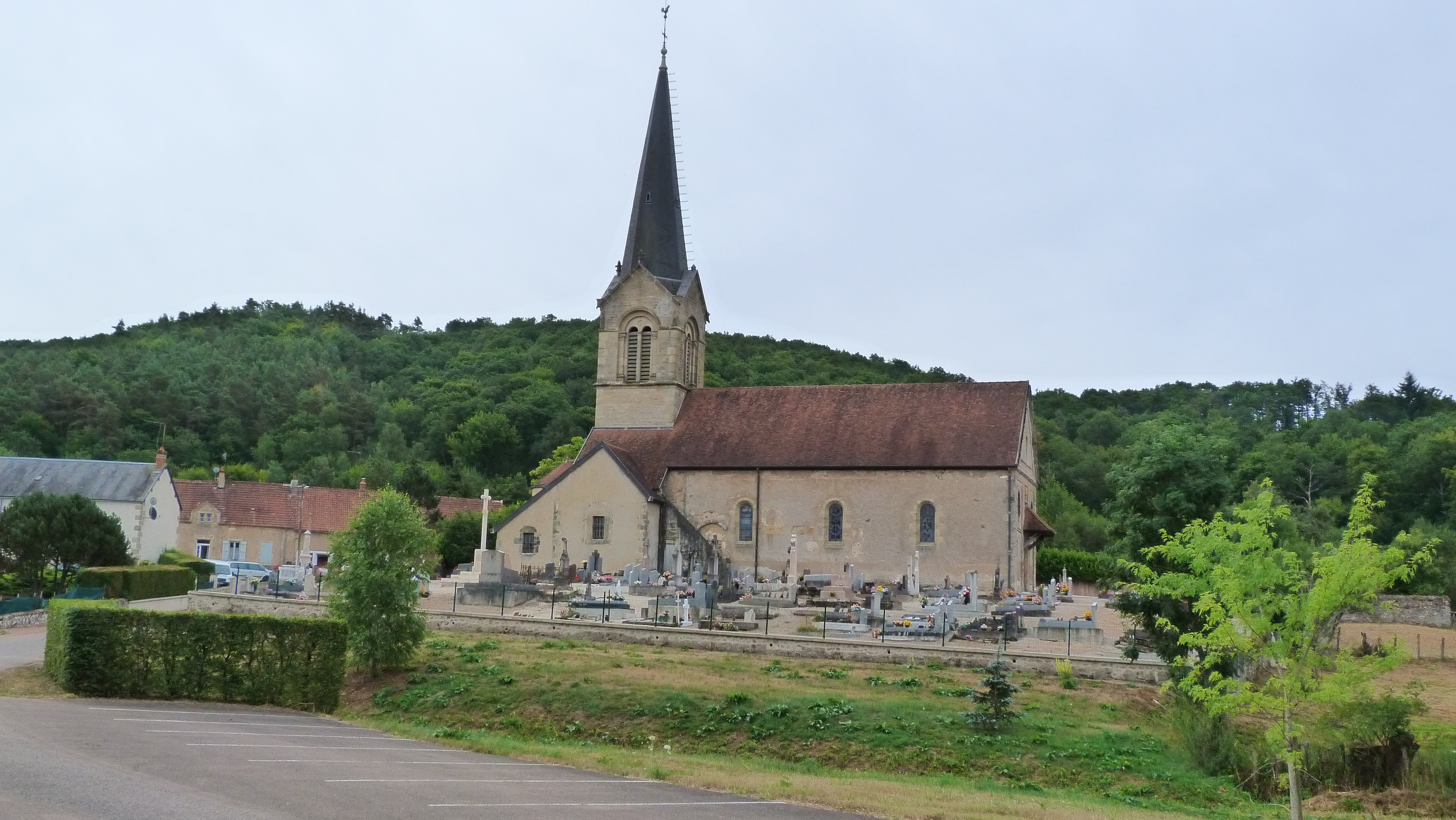 La preĝejo de Voudenay (Côte-d'Or)